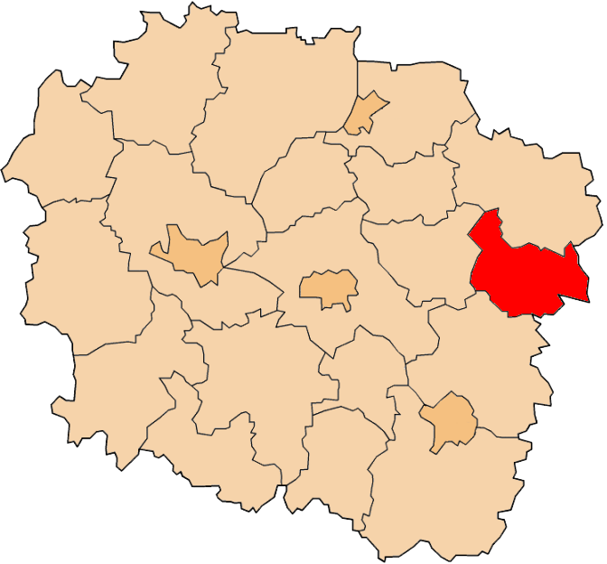 Powiat rypiński na mapie województwa kujawsko-pomorskiego.